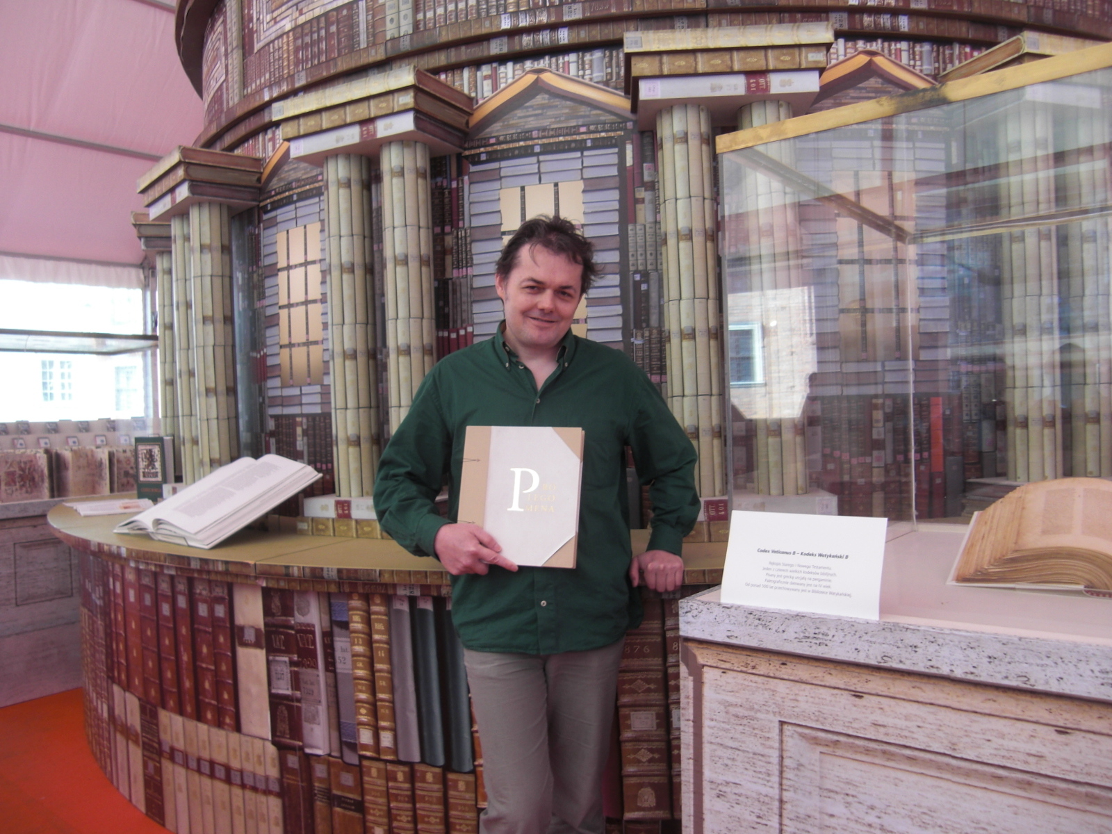 Leszek Jańczuk z Prolegomeną do Kodeksu Watykańskiego, XXI Targi Wydawców Katolickich 2015-05-03